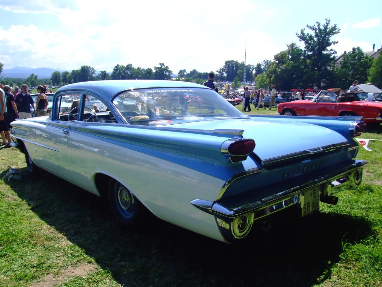 Quelle: selbst fotografiert, 06/2007 Fotograf: Späth Chr.